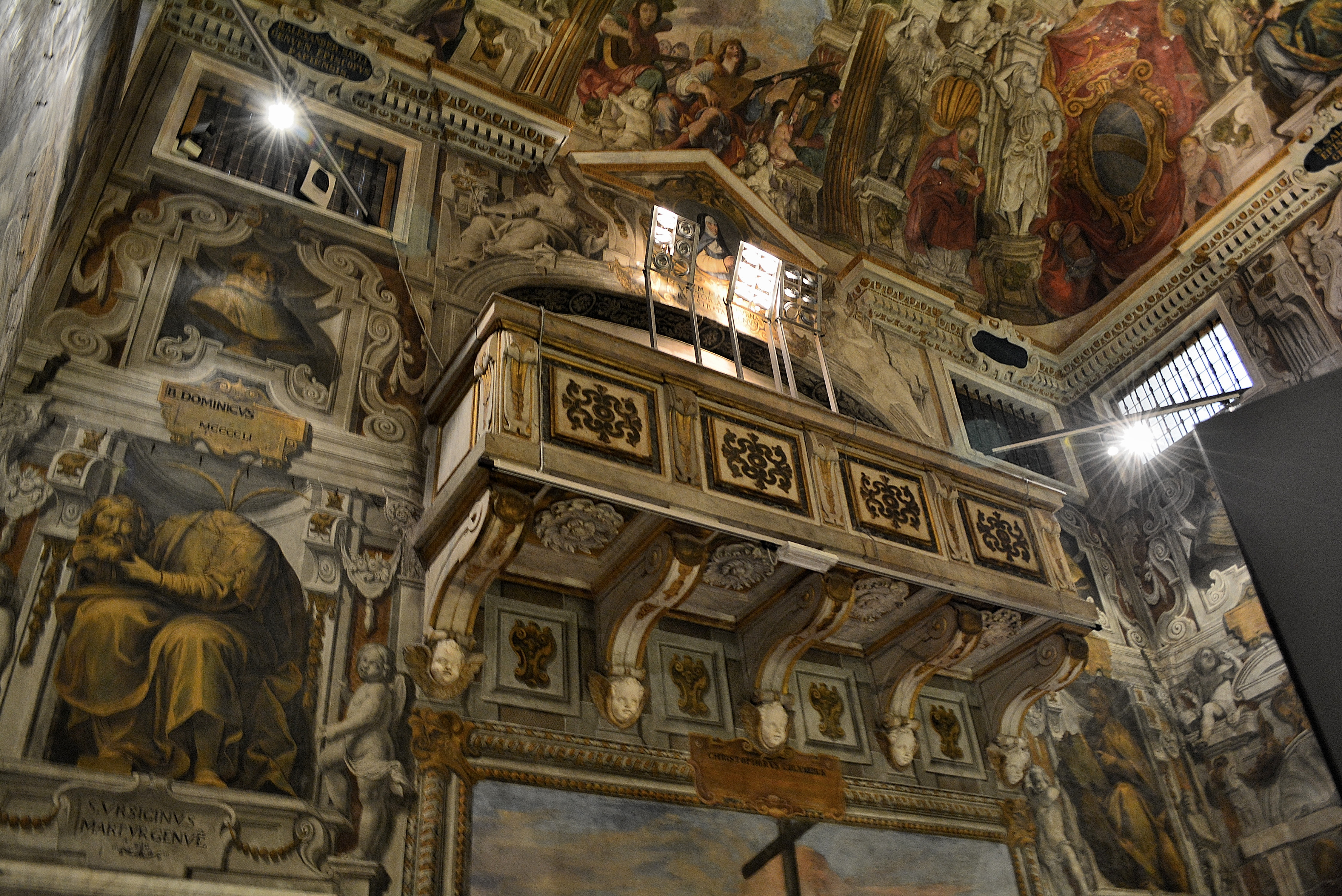 Palazzo Ducale di Genova This is a photo of a monument which is part of cultural heritage of Italy.